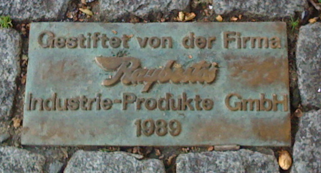 Plakette am Markt-Brunnen Radevormwald, gestiftet von Raybestos